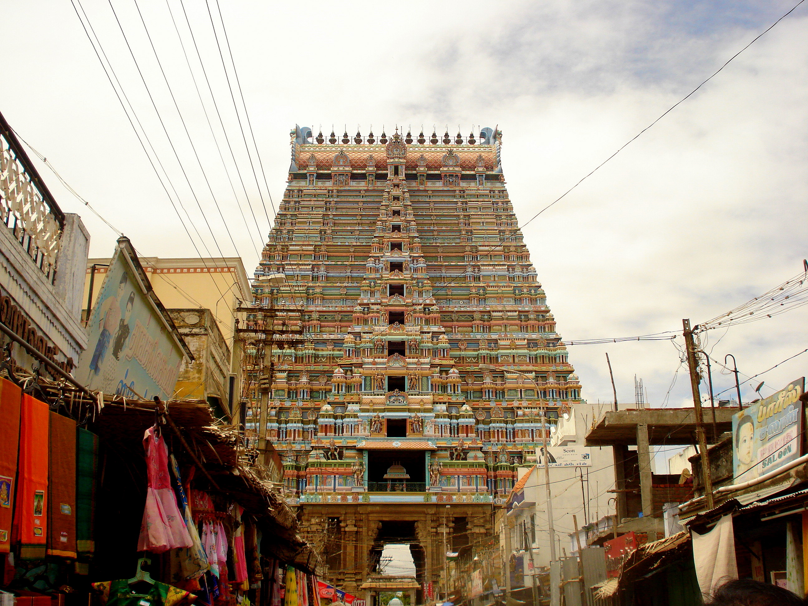 Sreeranganathaswamy temple gopuram, Trichy